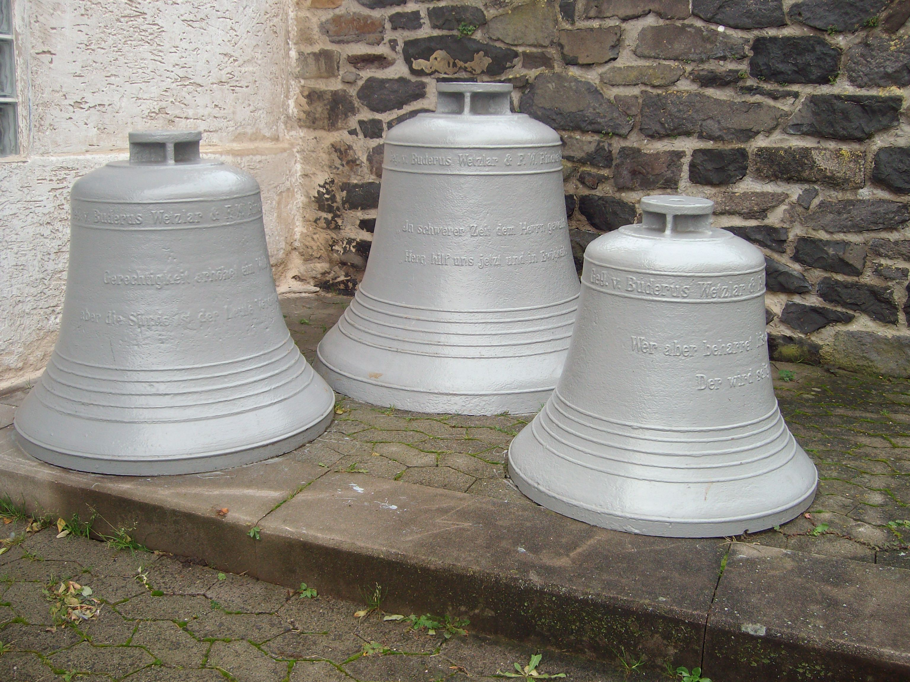 Glocken vor der Kirche in Birklar, Landkreis Lich, Hessen